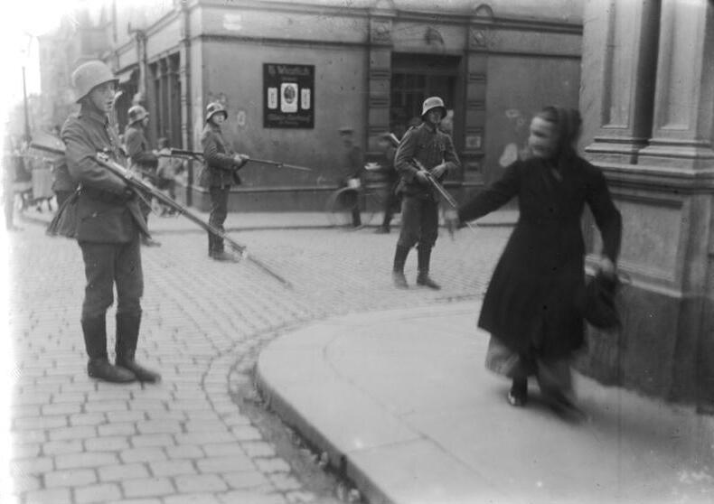 Vorgehen der Reichswehr gegen die kommunistischen Hundertschaften in Sachsen. Verhaftung eines kommunistischen Rädelsführers durch Reichswehr.